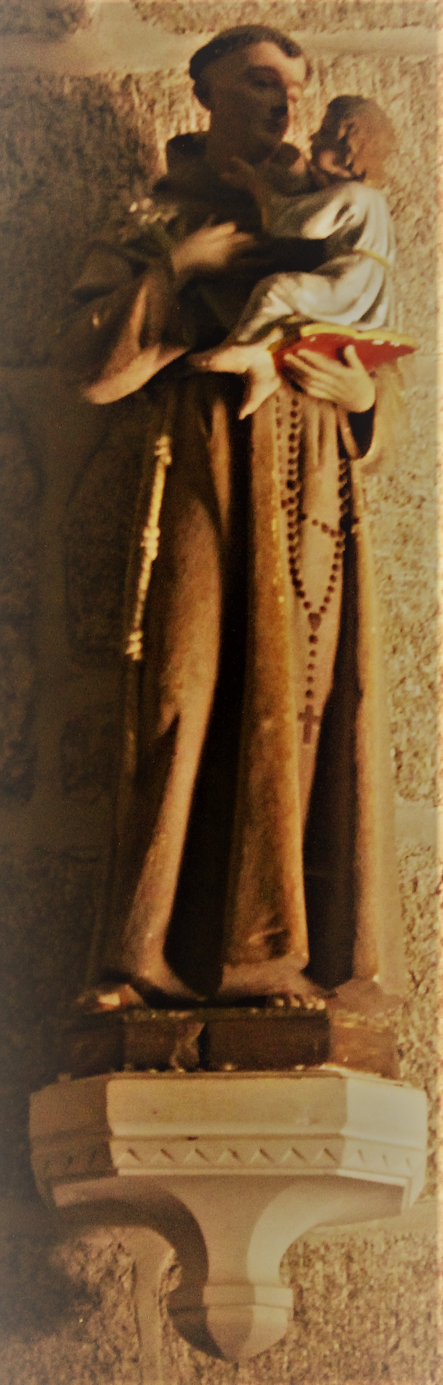 Statut de Saint Antoine de Padoue dans l'église Saint Genest d'Azat-le-Ris (Haute-Vienne).